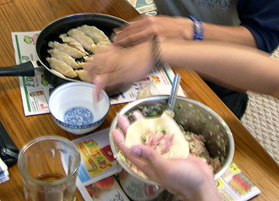 包zh:餃子的忙碌樣,prattflora拍於2003年7月